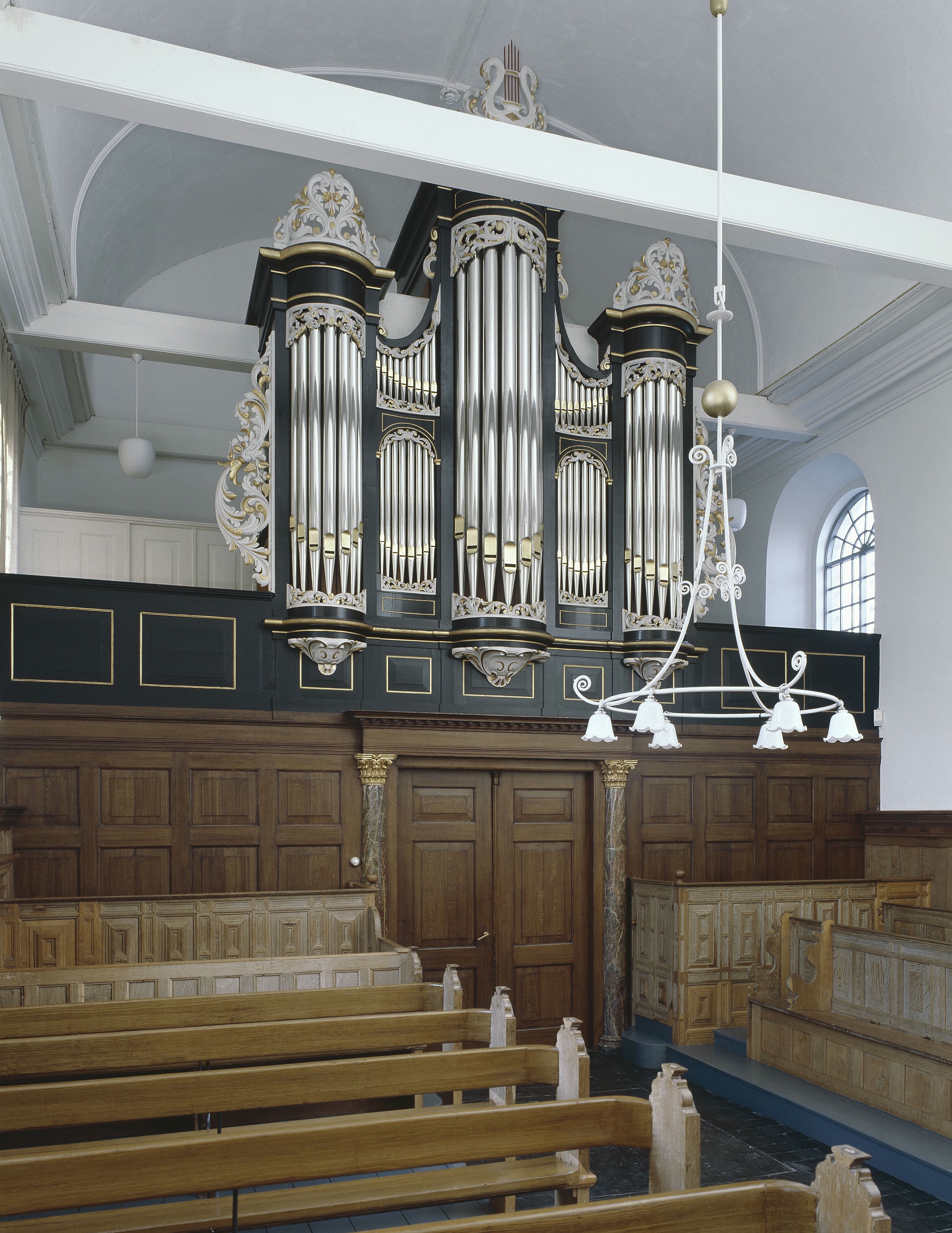 Nederlands Hervormde Kerk: Interieur, aanzicht orgel (opmerking: Gefotografeerd voor Het Historische Orgel in Nederland 1878-1886, Bladzijde 269)